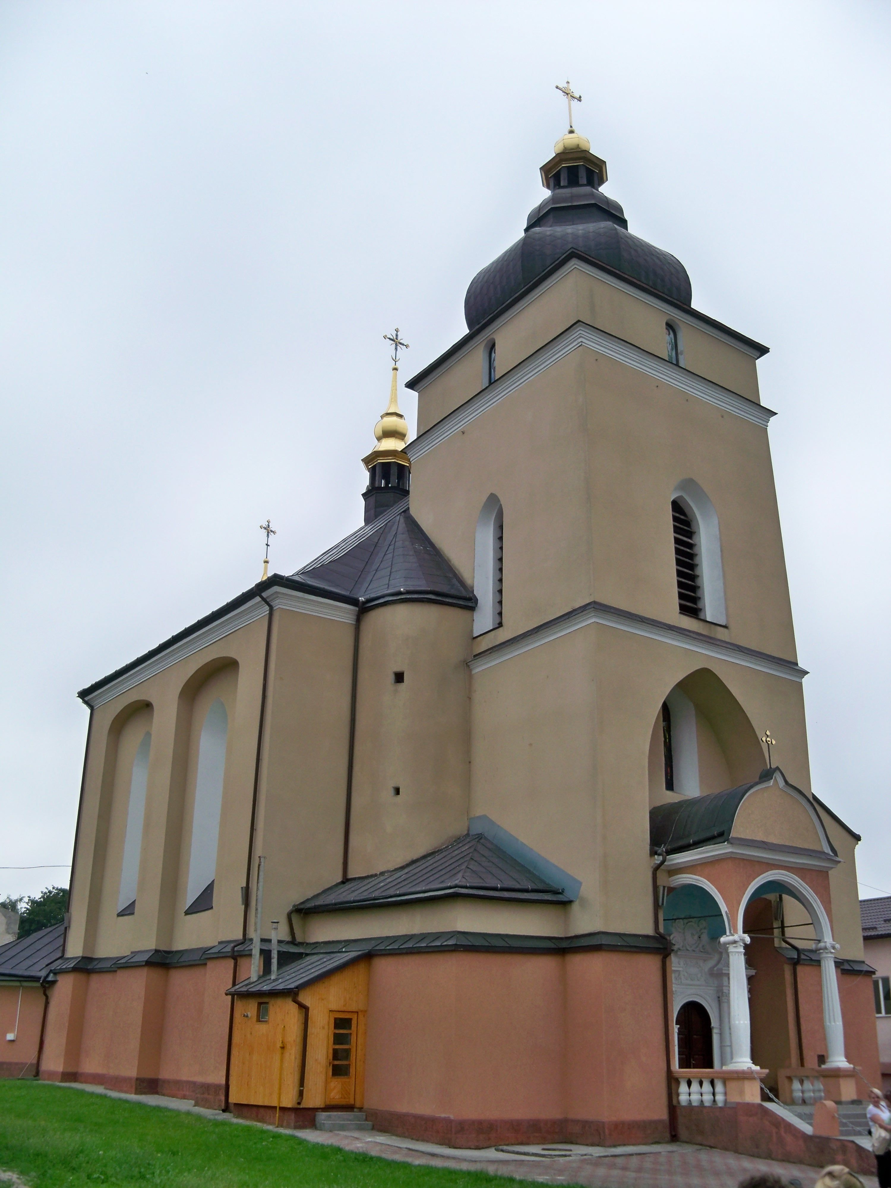 Церква Різдва Пресвятої Богородиці, Рогатин, пл. Роксолани, 19